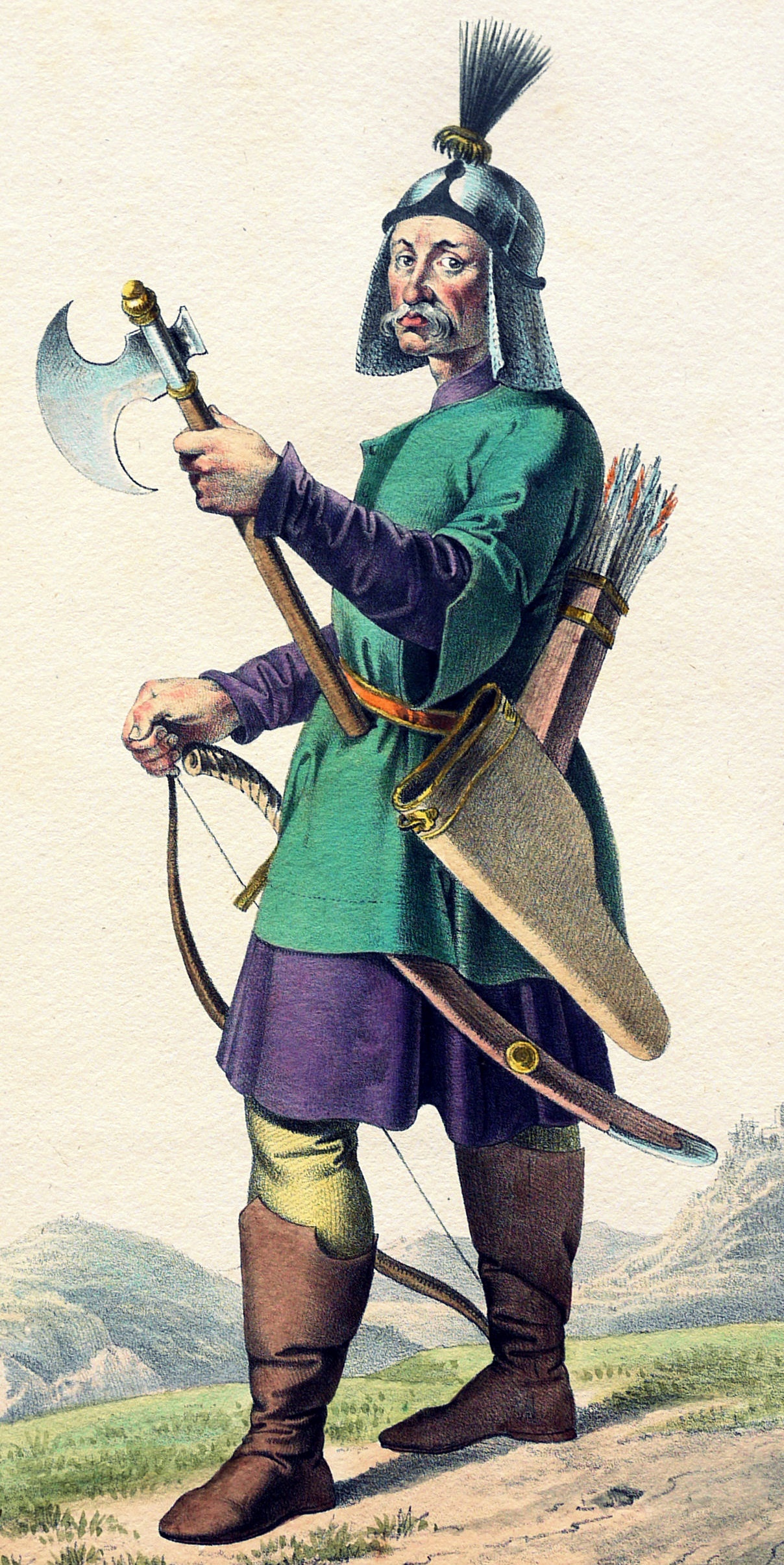 Bulcsú (gest. 935), magyarischer Heerführer, Lithographie von Josef Kriehuber nach einer Zeichnung von Moritz von Schwind aus Ungerns Erste Heerführer Herzoge und Koenige In einer Reihe von Bildnissen von Bela bis auf Seine Majestät Franz I. Kaiser Von Österreich König Von Ungern &c., &c. Wien : Lithographisches Institut ;ca. 1828